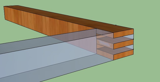 Dupla ollós csap